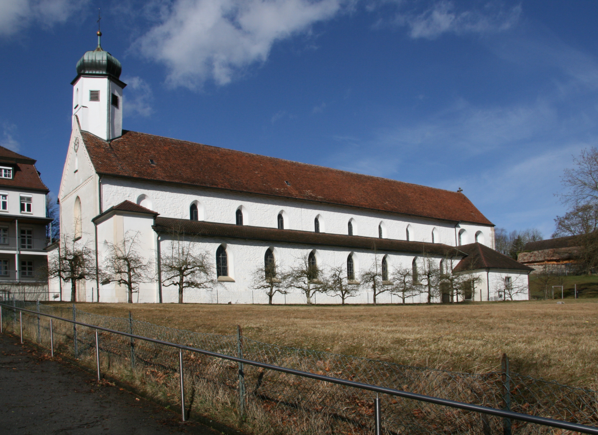 Pfarrkirche St. Johannes Baptist, Baindt (ehem. Klosterkirche Unserer lieben Frau)